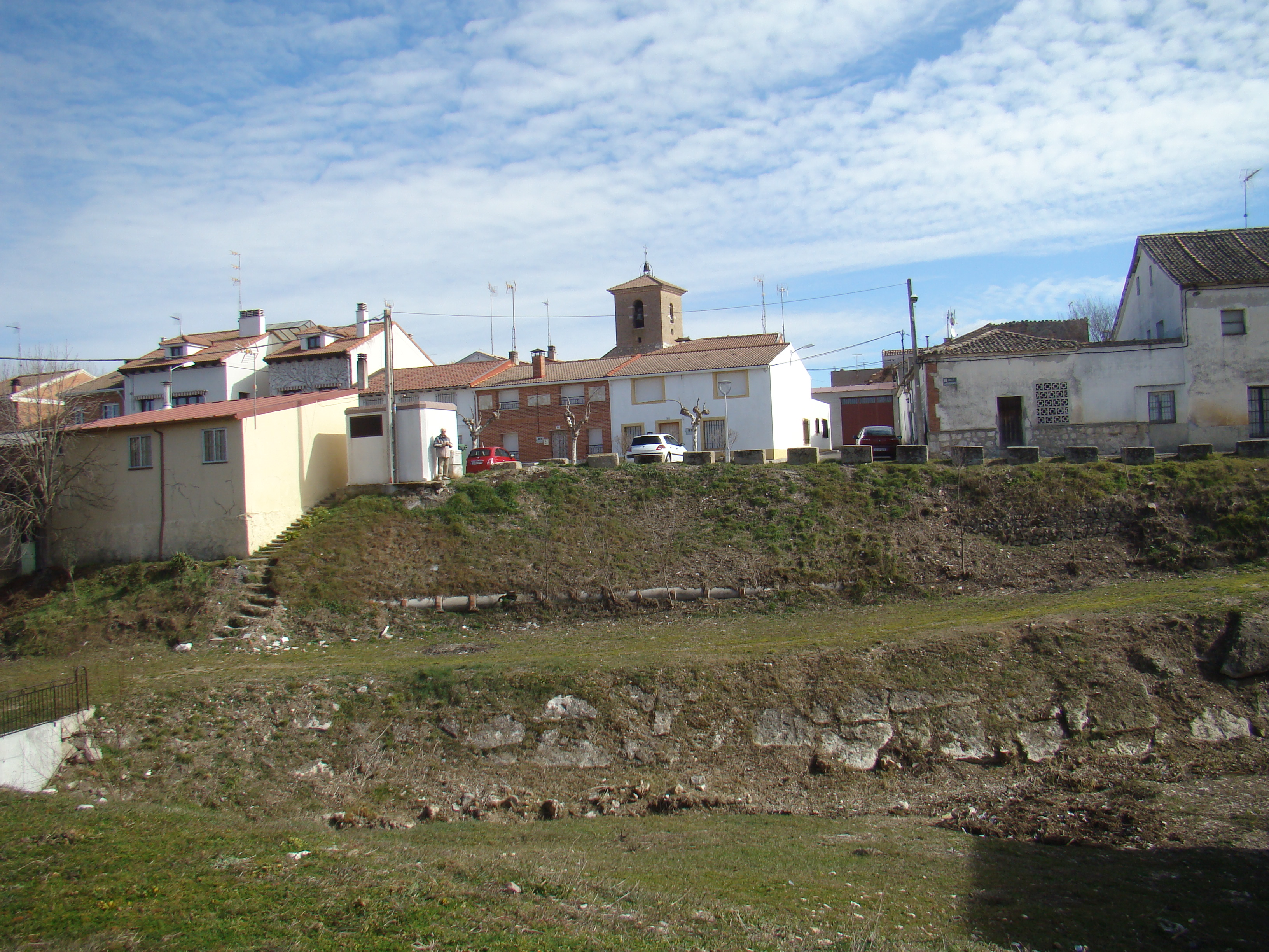 Sardón de Duero, Valladolid, España. Vista del pueblo desde el molino de Santa Eugenia.